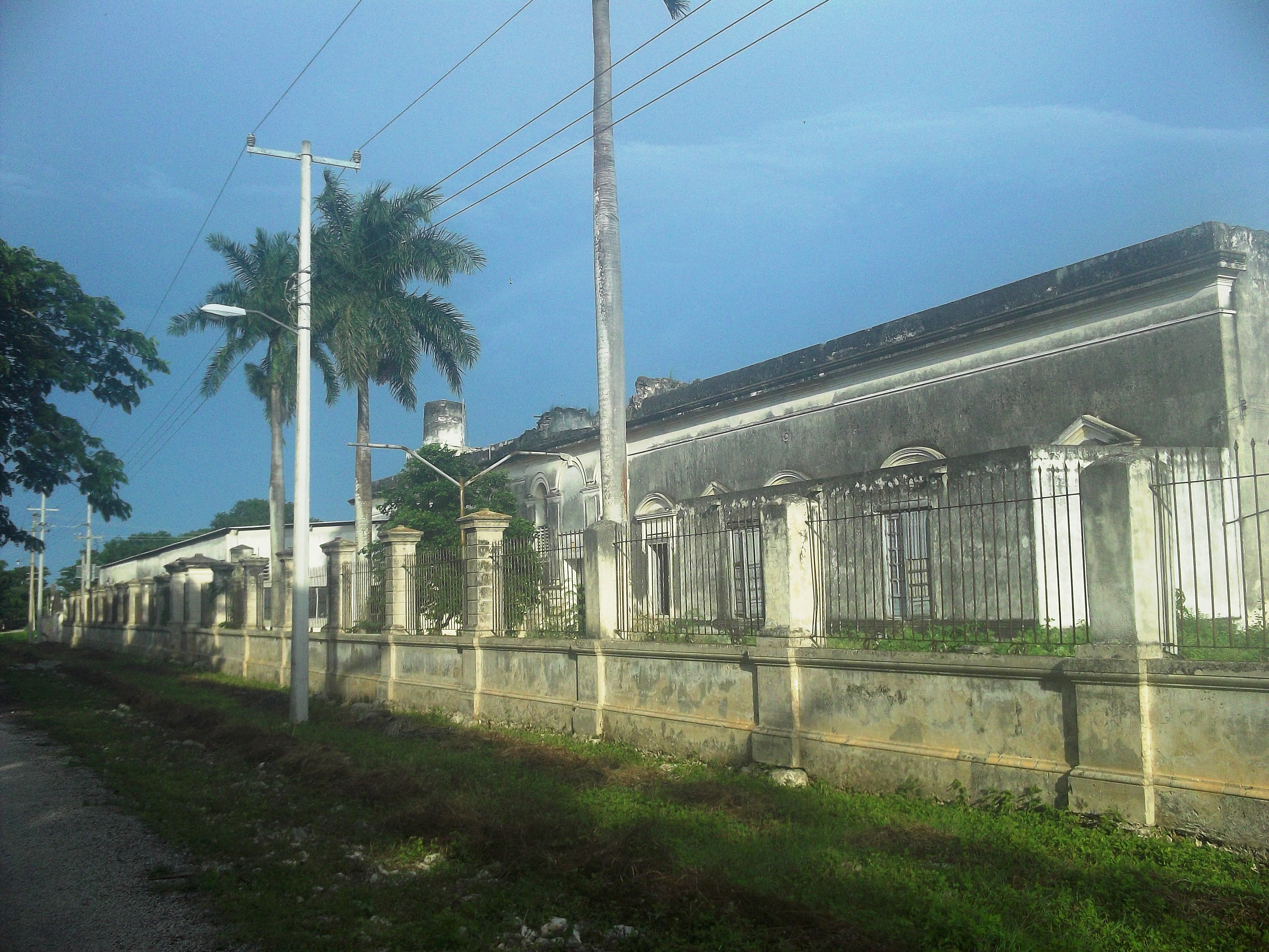 Vista de la hacienda de San Nicloás, Yucatán.